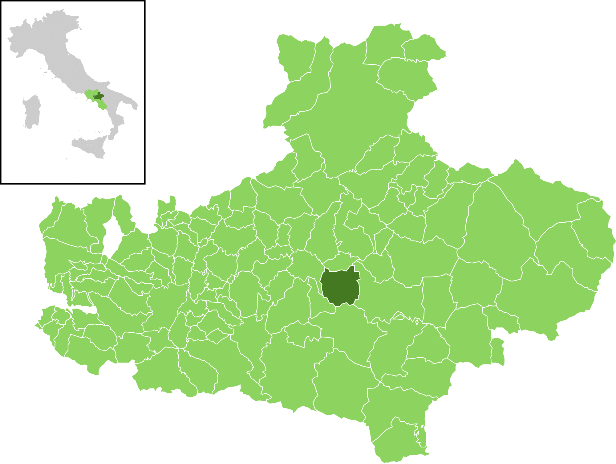 Posizione del comune all'interno della provincia di Avellino